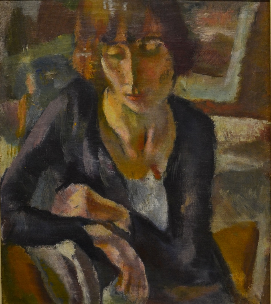 Jules Pascin, Hermine David. Huile sur toile. 1919. Don de Hermine David et Lucy Krohg, 1937. Inv. 1937-39.